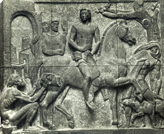 Relieve de San Martín de Tours, con el que Antonio Cano obtuvo la primera medalla en el concurso naciona de Bellas Artes en la modalidad de escultura, en el año 1954. Esta obra se encuentra en el Museo de Bellas Artes de Jaen.